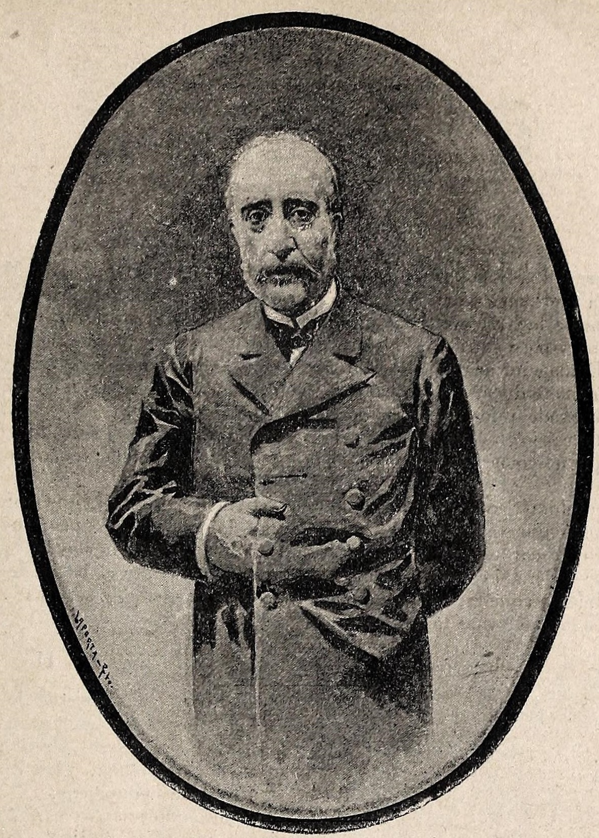 Excmo. Sr. D. Miguel de los Santos Álvarez. Fallecido en Madrid el día 15 de noviembre de 1892